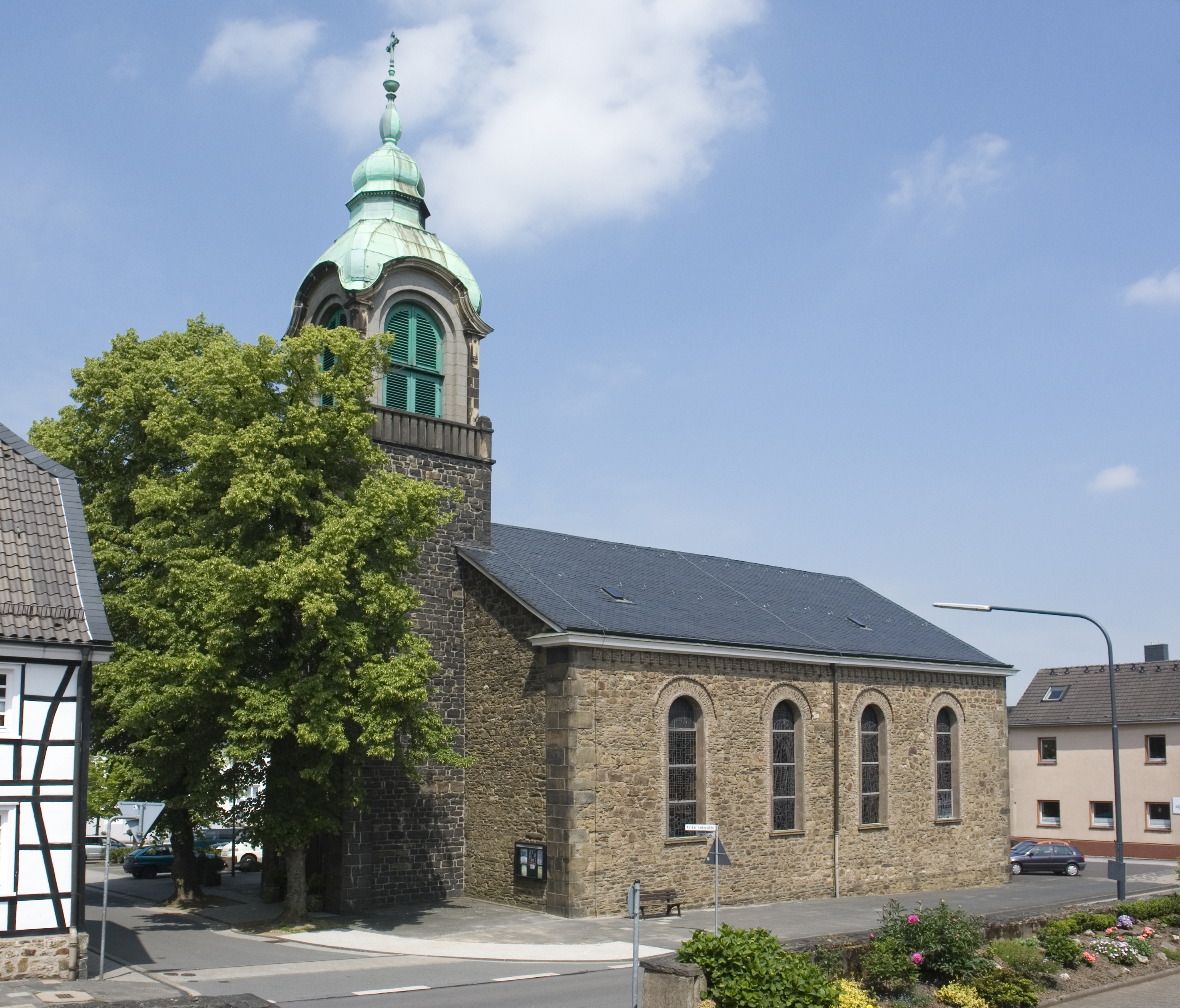 Radevormwald, Evangelisch-Lutherische Martini-Kirche